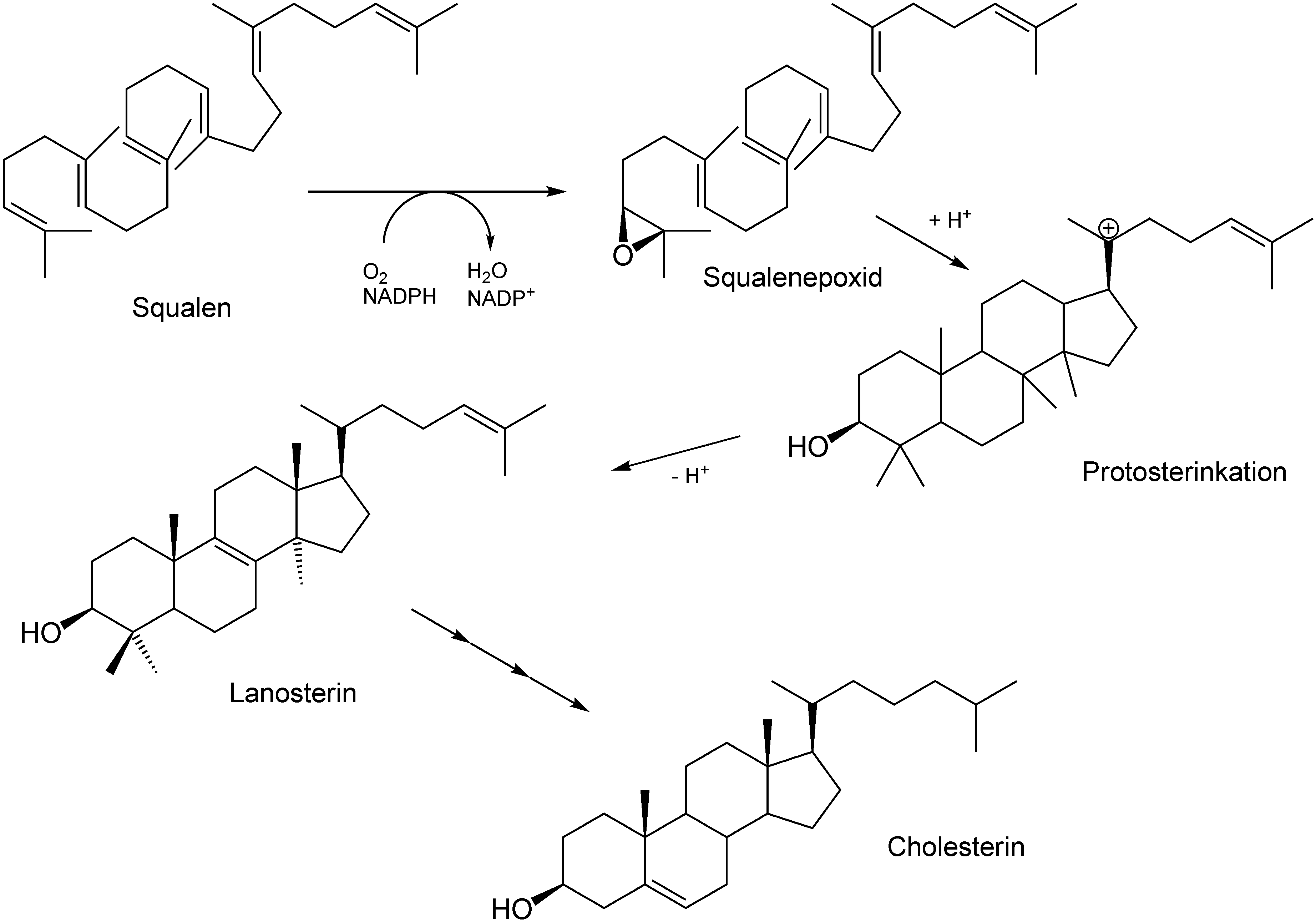 Cholsterinsynthese ausgehend von Squalen